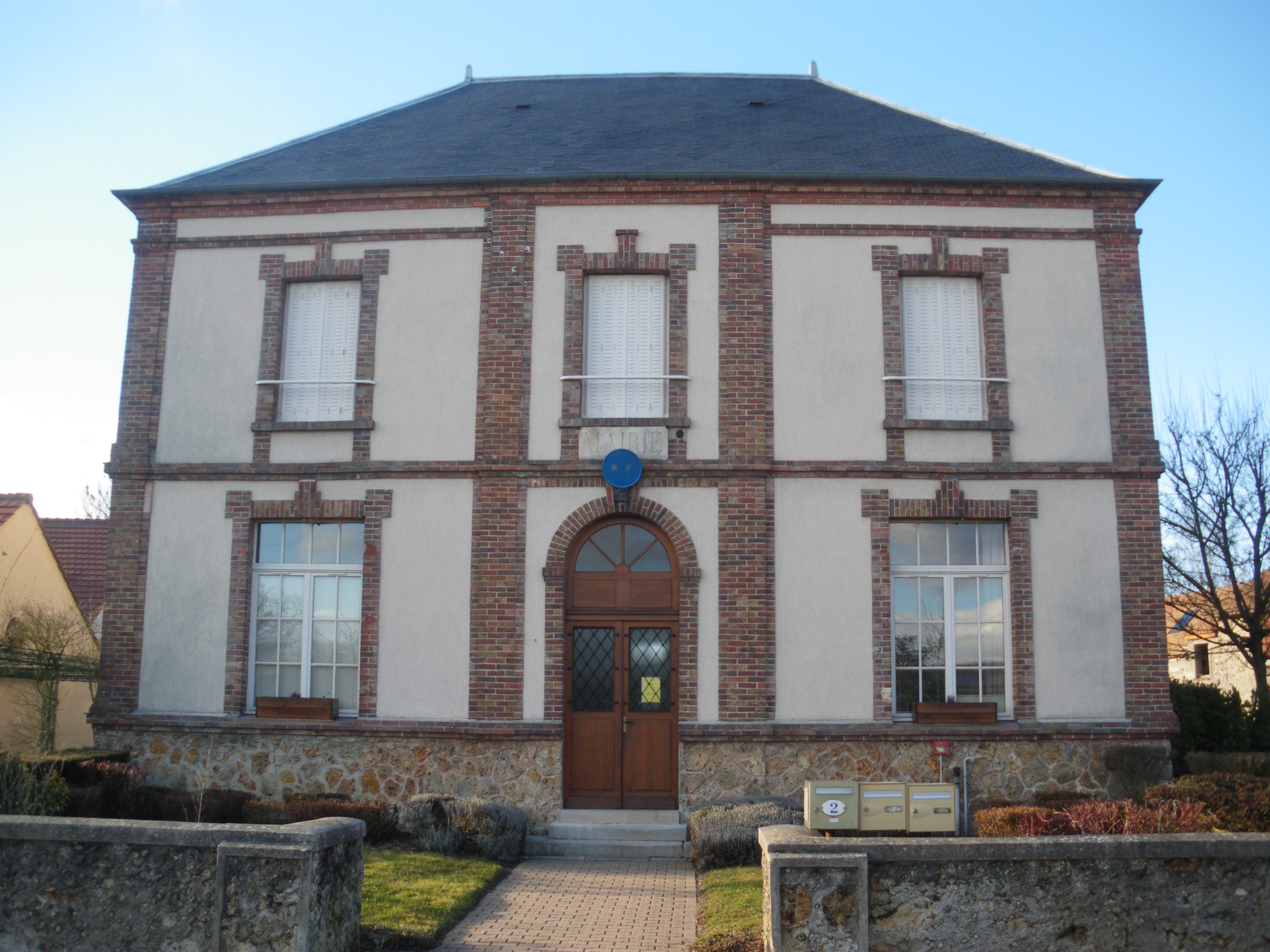 Mairie de Boullay-les-Troux (Essonne, Île-de-France, France).